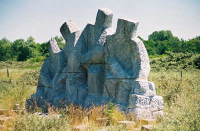 Description monument de dijkwerkers aan de Veersegatdam Date10 March 2005SourceOwn workAuthorLuPermission (Reusing this file) GFDL monument de dijkwerkers aan de Veersegatdam